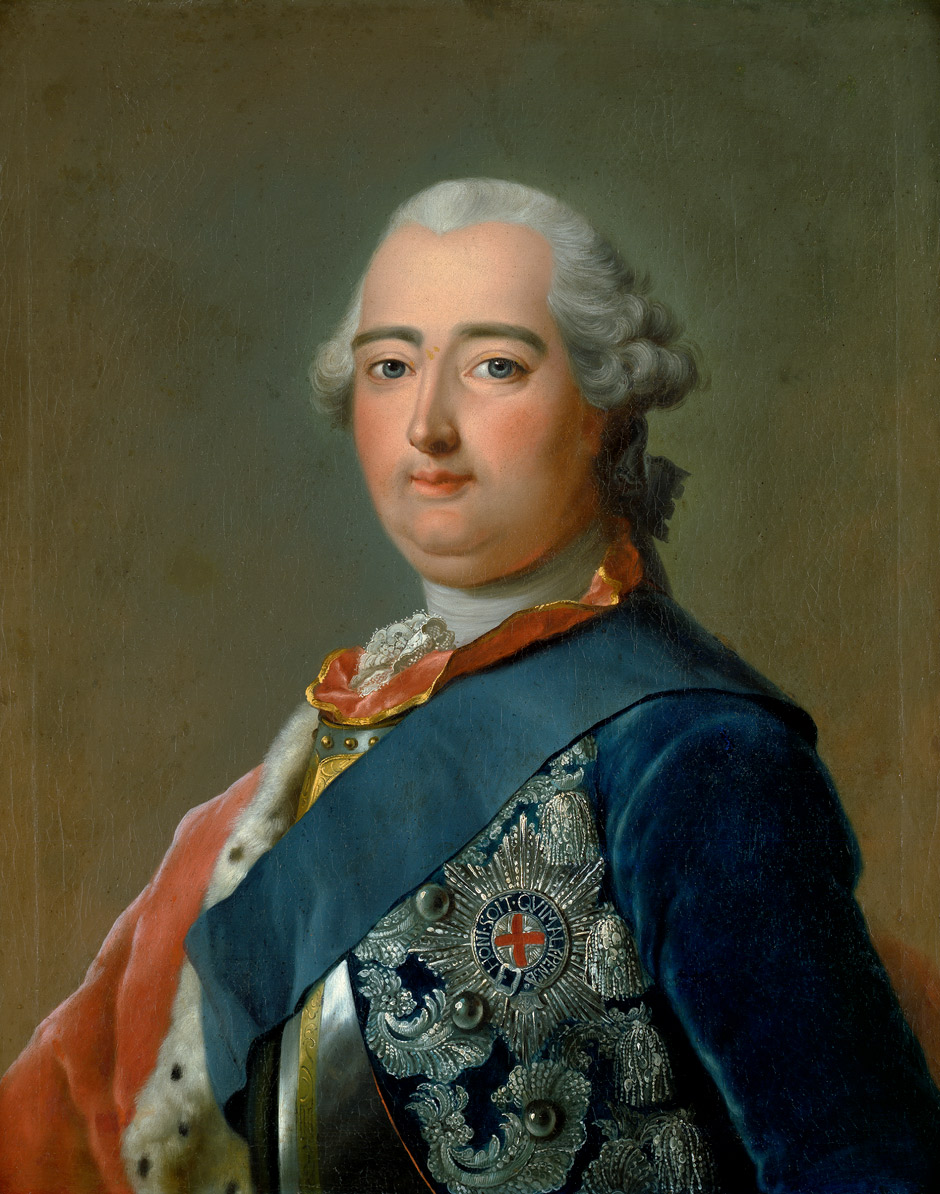 Porträt des Landgrafen Friedrich II. von Hessen-Kassel mit Band und Stern des Hosenbandordens.